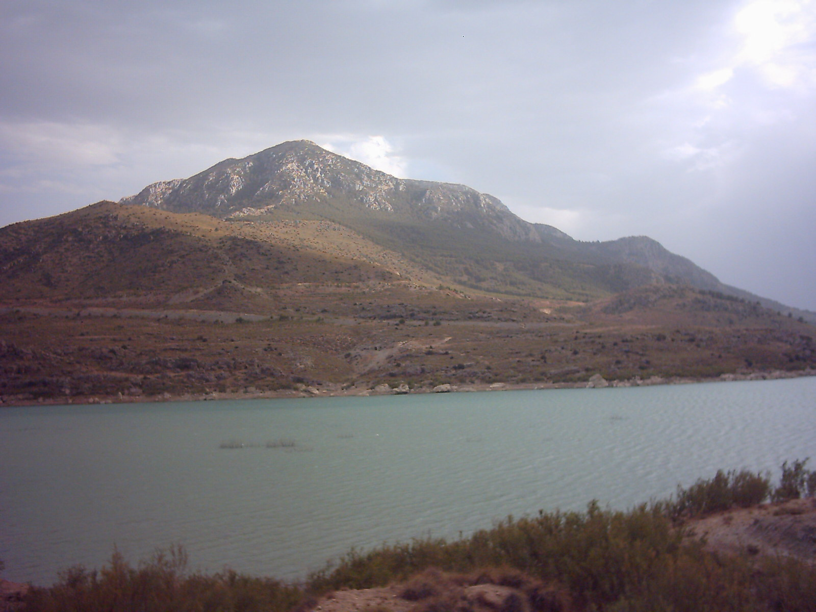 Vista del embalse del Negratín, situado en la provincia de Granada (España), desde la pedanía de Los Términos (municipio de Baza).